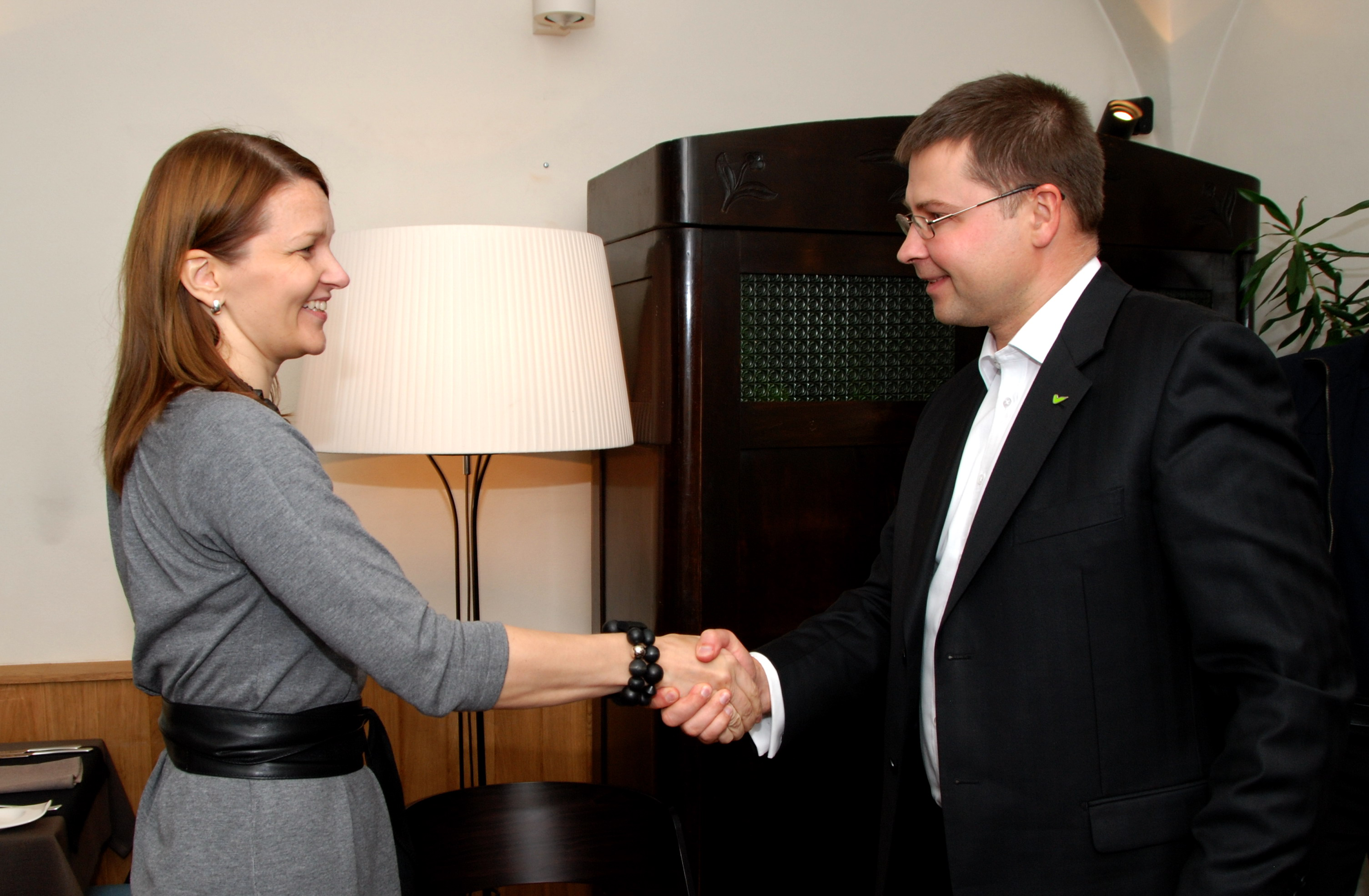 Latvijas Republikas Ministru prezidents Valdis Dombrovskis tiekās ar Somijas Republikas premjerministri Mari Kiviniemi (Mari Kiviniemi), kura Rīgā ieradusies privātā vizītē Foto: Aivis Freidenfelds, Valsts kanceleja